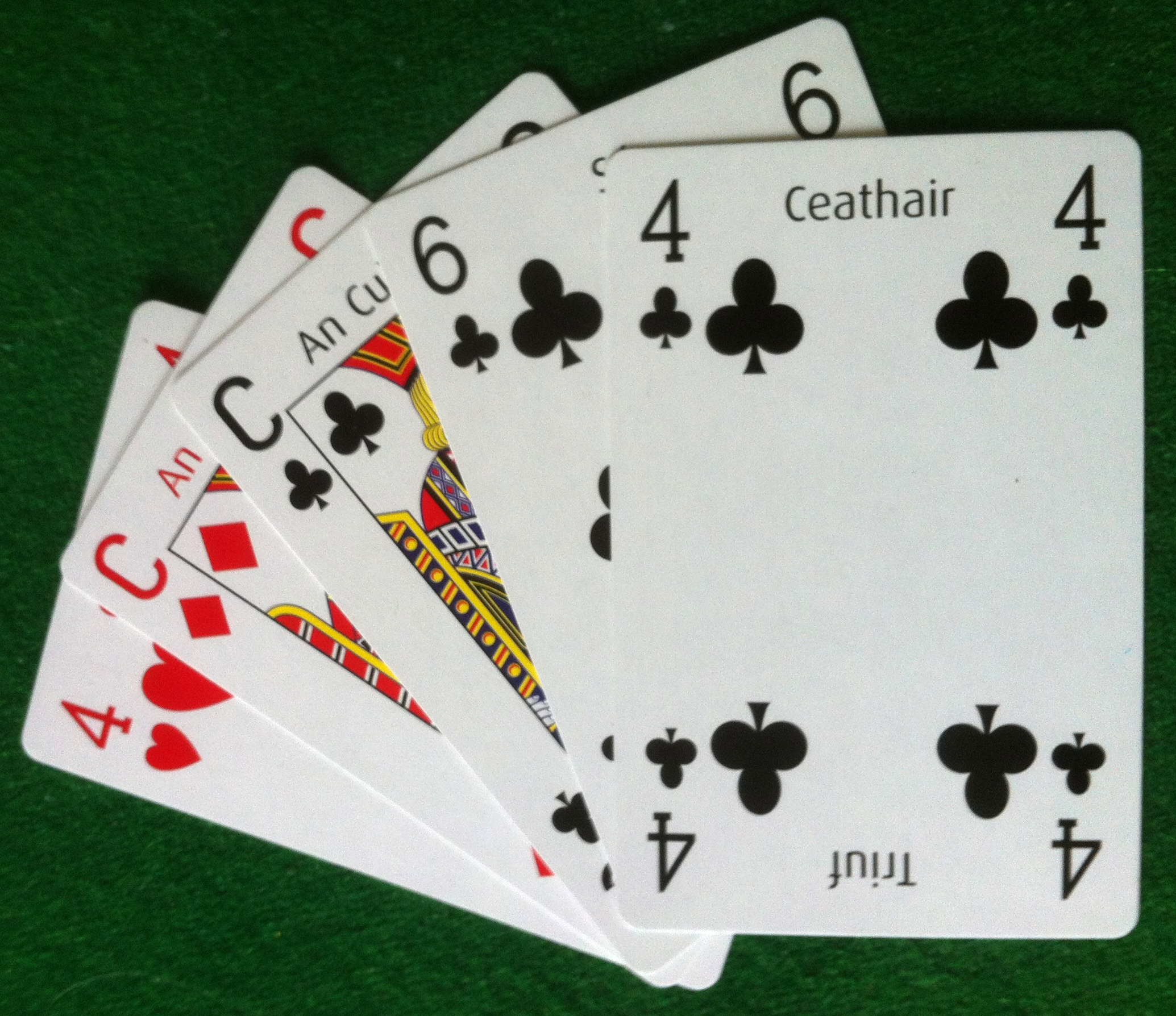 Lámh Cártaí